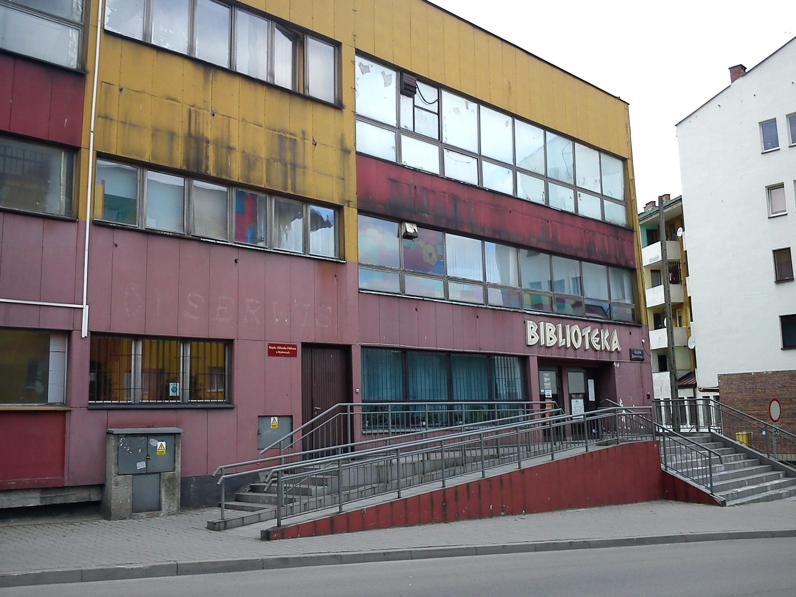 Mysłowice-Miejska Biblioteka Publiczna.